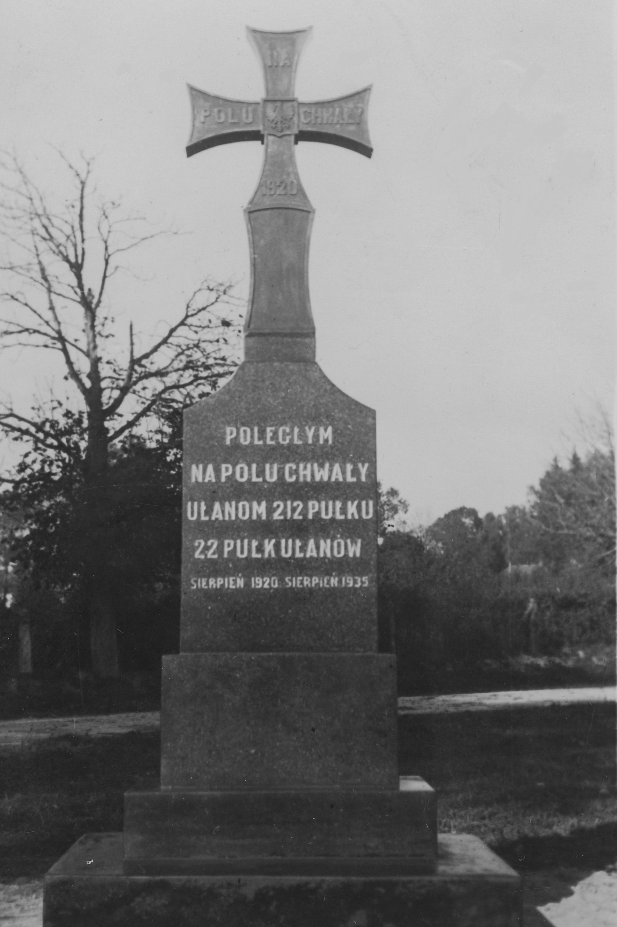 Pomnik ku czci żołnierzy 22 pułku ułanów poległych w 1920 r. w Skrzeszewie. Koncern Ilustrowany Kurier Codzienny - Archiwum Ilustracji. Sygnatura: 1-U-5747